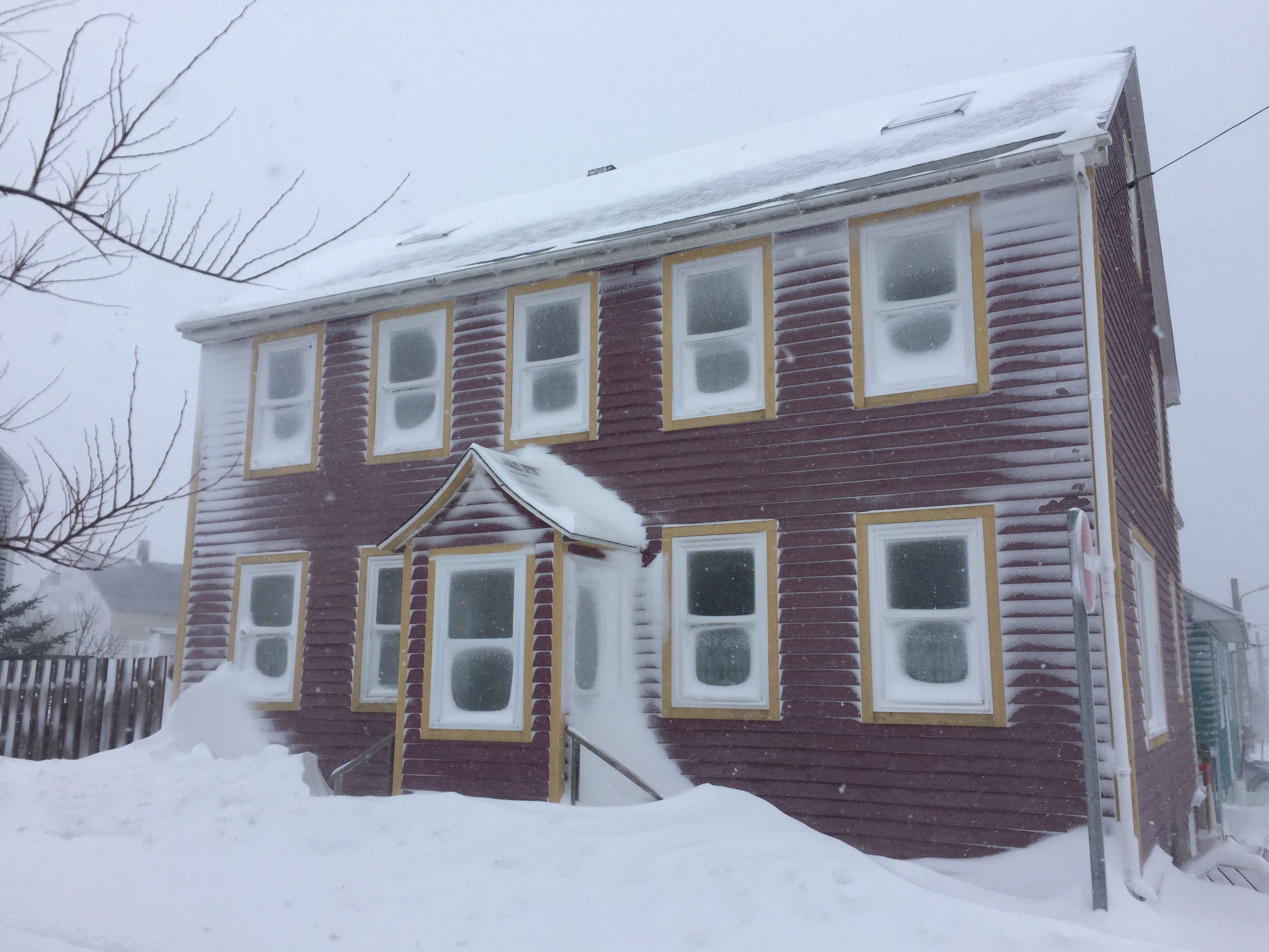 Rue Paul Lebailly à Saint-Pierre